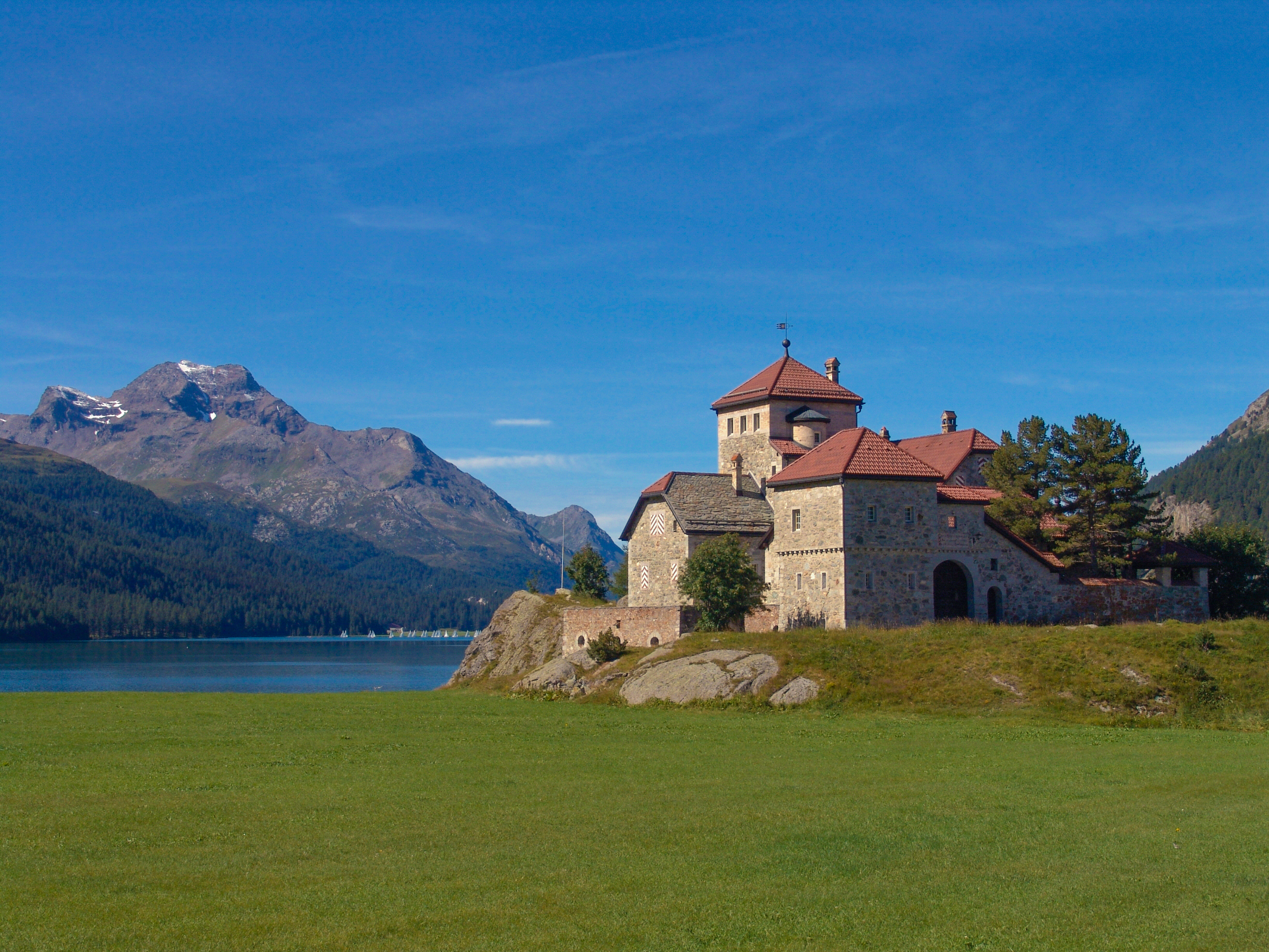 Chastè Crap da Sass